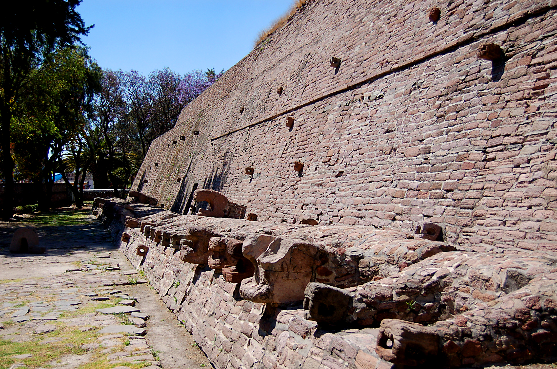 serpent wall at Tenayuca pyramid